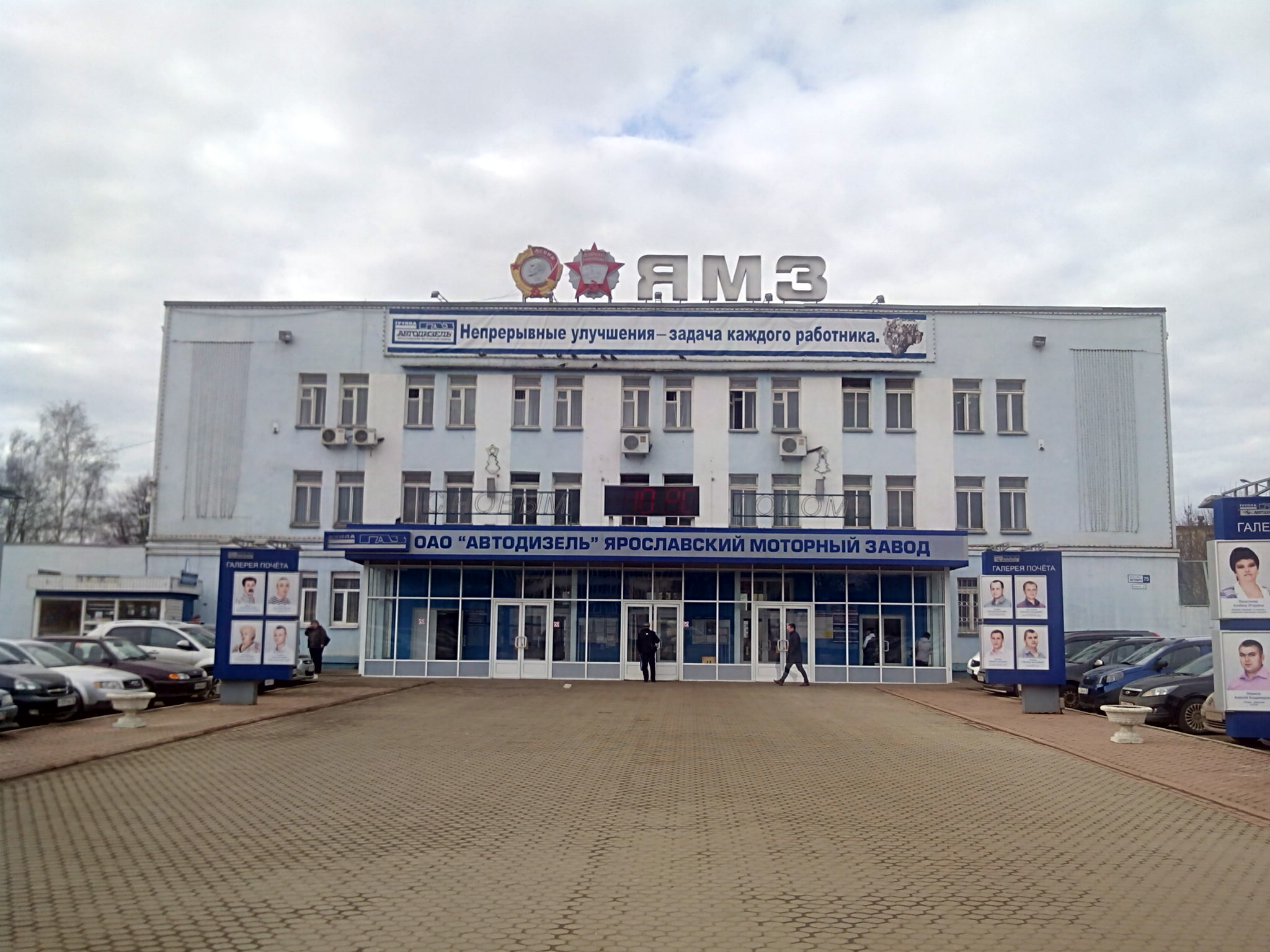 Проходная завода Автодизель (Ярославский моторный завод)